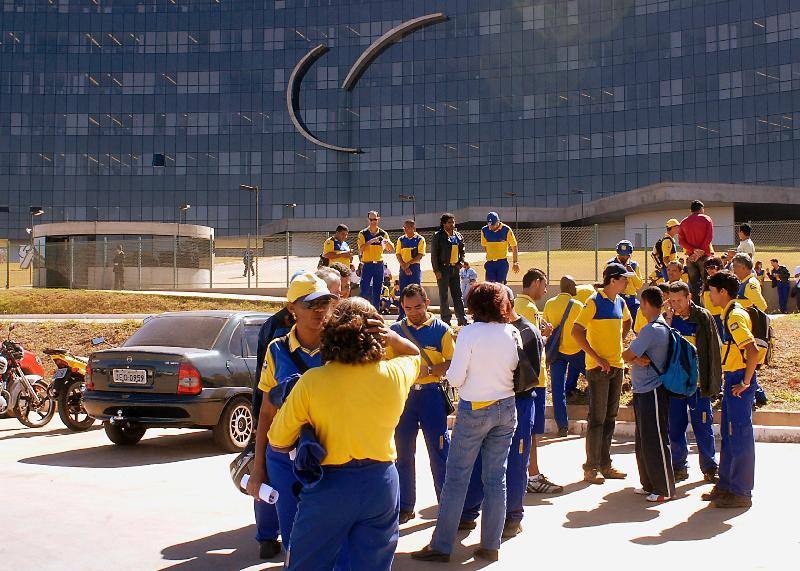 Trabalhadores dos Correios em frente à sede do Tribunal Superior do Trabalho (TST)